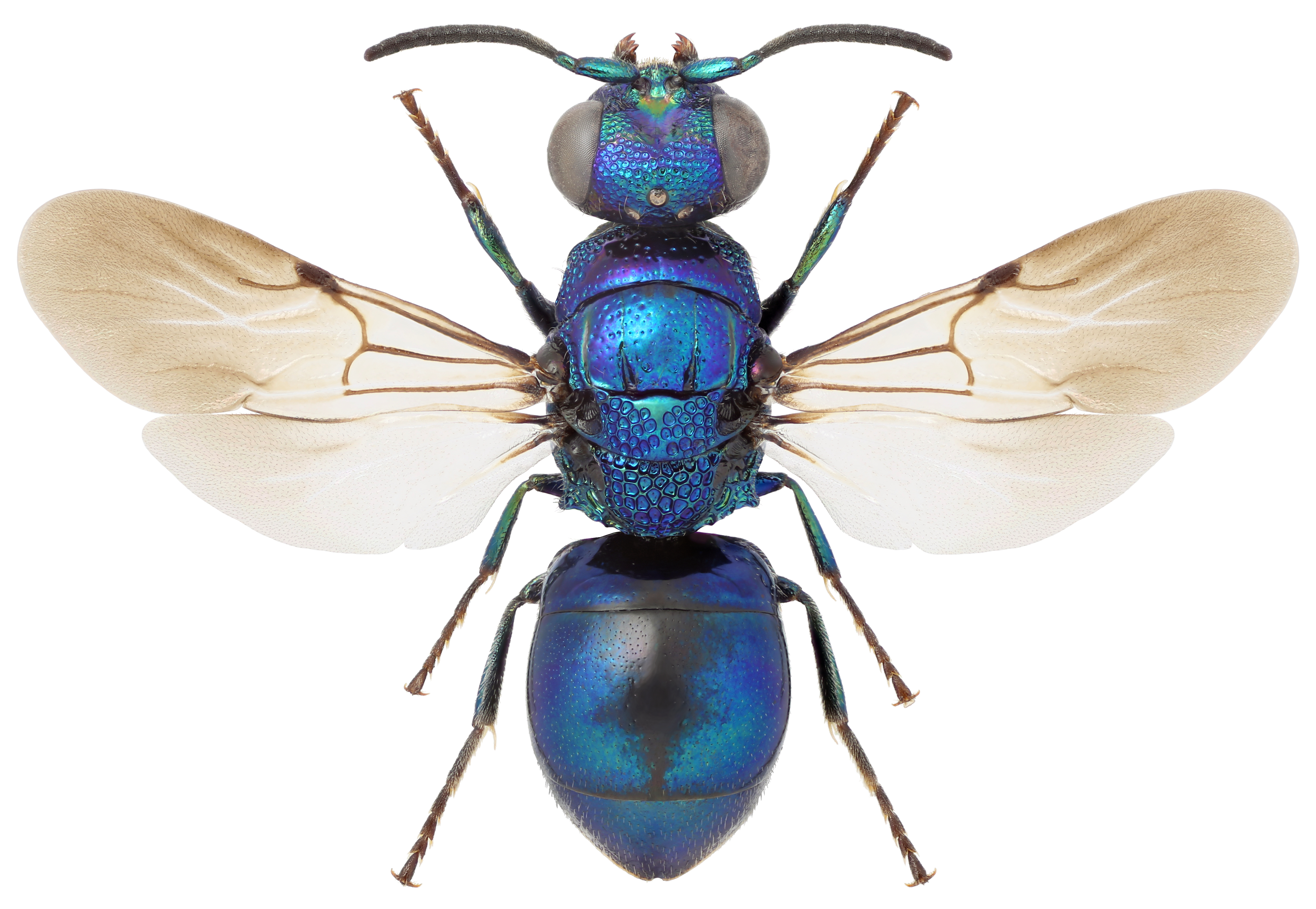 Punktuert kulegullkvefs (Omalus puncticollis)